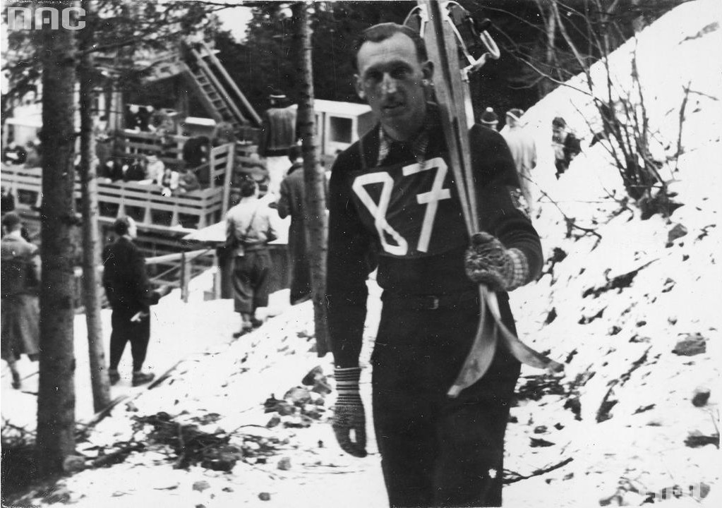 Hans Lahr à Zakopane en 1939